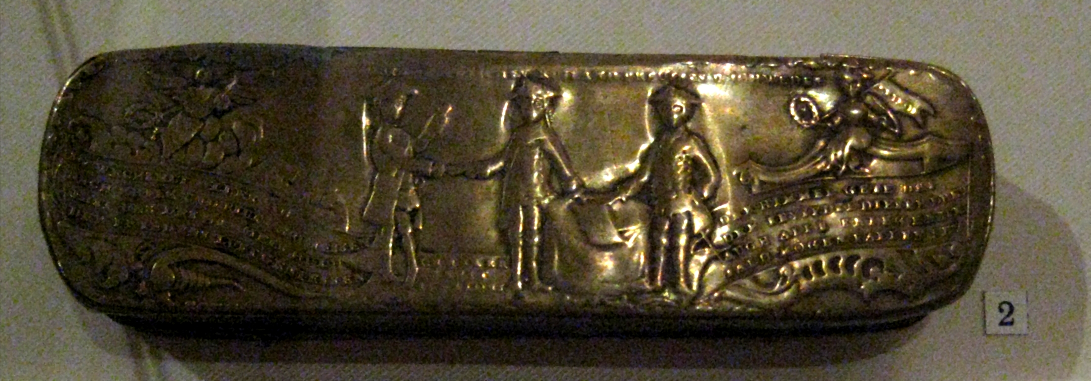 Табакерка на заключение мира между Пруссией, Россией и Швецией. 1762. Латунь. Иоганн Генрих Хамер